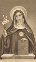 Image pieuse de Julienne Falconieri